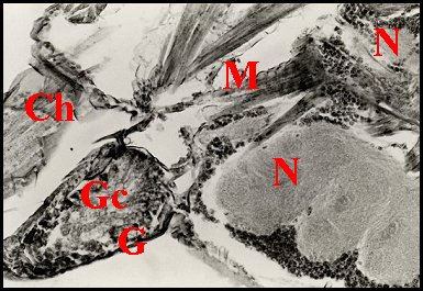 Coupe parasagittale du prosoma de Leptoneta infuscata femelle montrant les glandes "salivaires" classiques, seules présentes